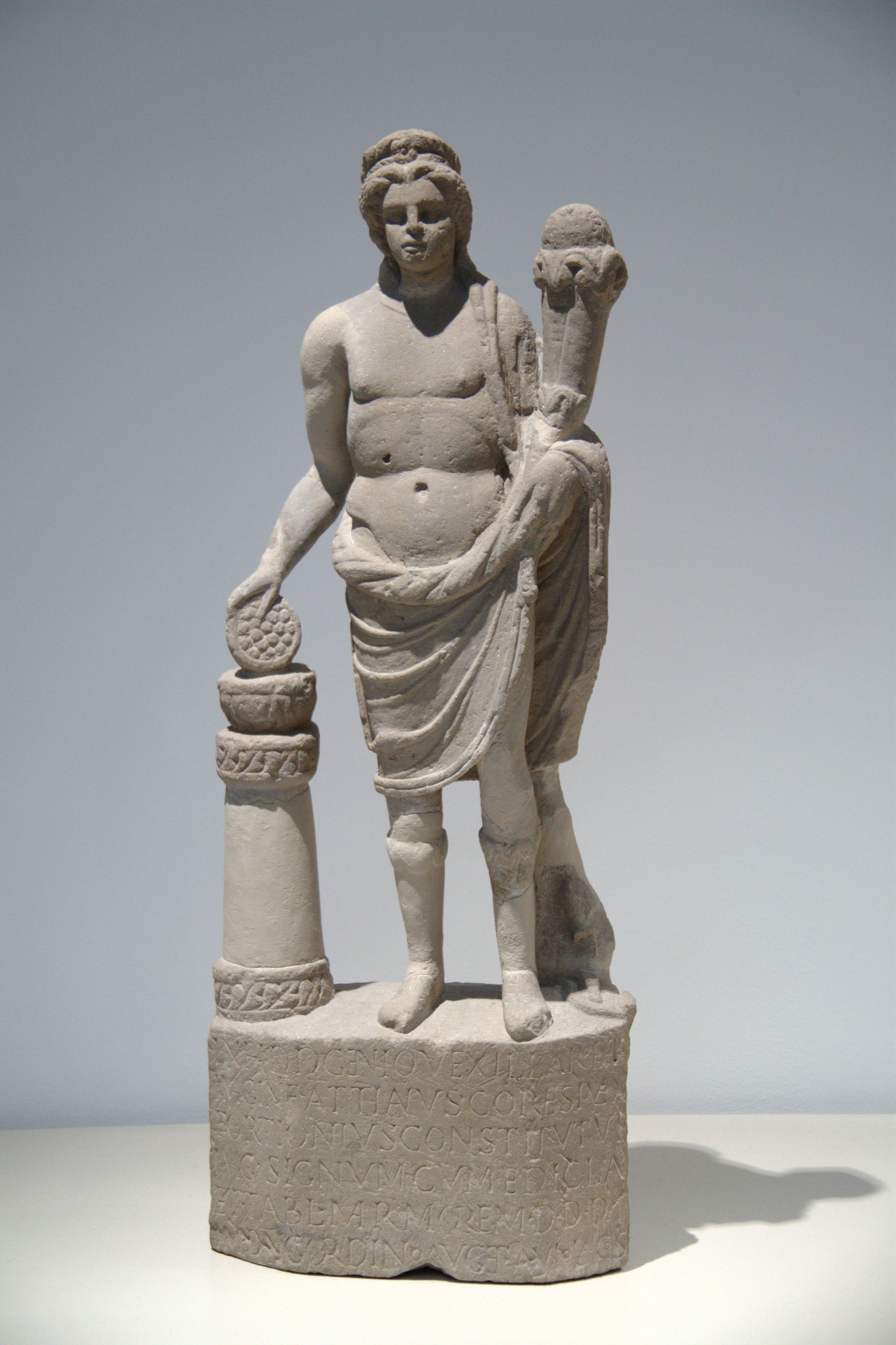 Ausstellungsstück im Landesmuseum Bonn. CIL XIII 7753: In h(onorem) d(omus) d(ivinae) Genio vexillar(iorum) et / imaginif(erorum) Attianus Coresi vex(illarius) / Fortionius Constitutus / imag(inifer) signum cum (a)edic(u)la / et tab(u)l(am) marmoream d(onum) d(ederunt) d(edicaverunt) / Imp(eratore) d(omino) n(ostro) Gordi(a)no Aug(usto) et Aviola co(n)s(ulibus) Rheinisches Landesmuseum Bonn Native nameLVR-LandesMuseum Bonn. Rheinisches Landesmuseum für Archäologie, Kunst- und KulturgeschichteParent institutionLandschaftsverband RheinlandLocationBonnCoordinates50° 43′ 54.84″ N, 7° 05′ 33″ E Established1820 (as "Antiquitäten-Museum")Web page control : Q318614 VIAF: 133114074 ISNI: 0000 0001 0942 0528 LCCN: n80098179 GND: 37793-4 SUDOC: 027410803 WorldCat institution QS:P195,Q318614